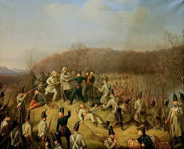 Hauptmann Lipp im Gefecht bei Dossenbach.title QS:P1476,de:"Hauptmann Lipp im Gefecht bei Dossenbach." label QS:Lde,"Hauptmann Lipp im Gefecht bei Dossenbach."